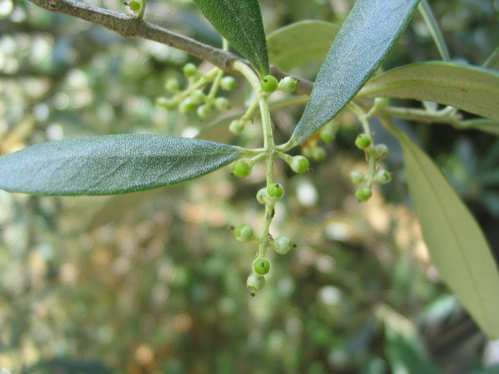 Olives jeunes. Des olives jeunes sur un olivier. Image tirée de et sous licence ArtLibre Camille Boulière